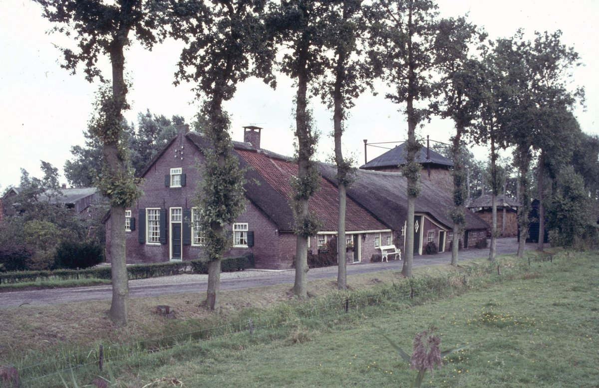 Boerderij Wolfstede: Exterieur OVERZICHT VOORGEVEL EN RECHTER ZIJGEVEL